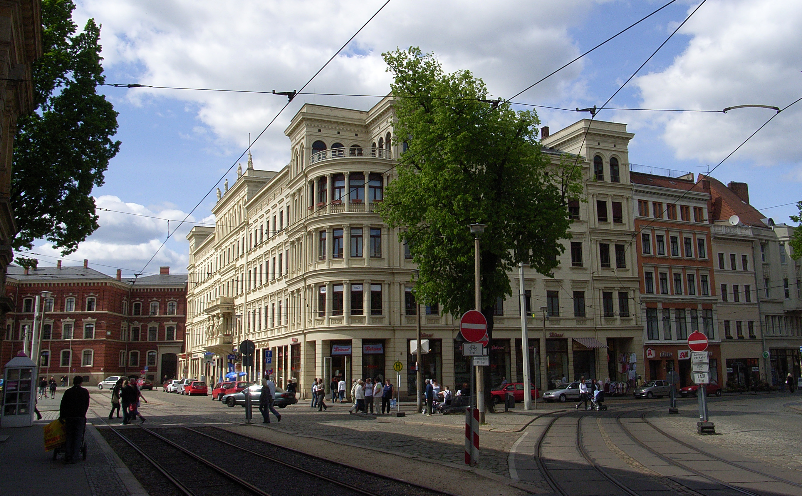 Česky: Zástavba v Görlitz, pohraničním městě na německo-polské hranici